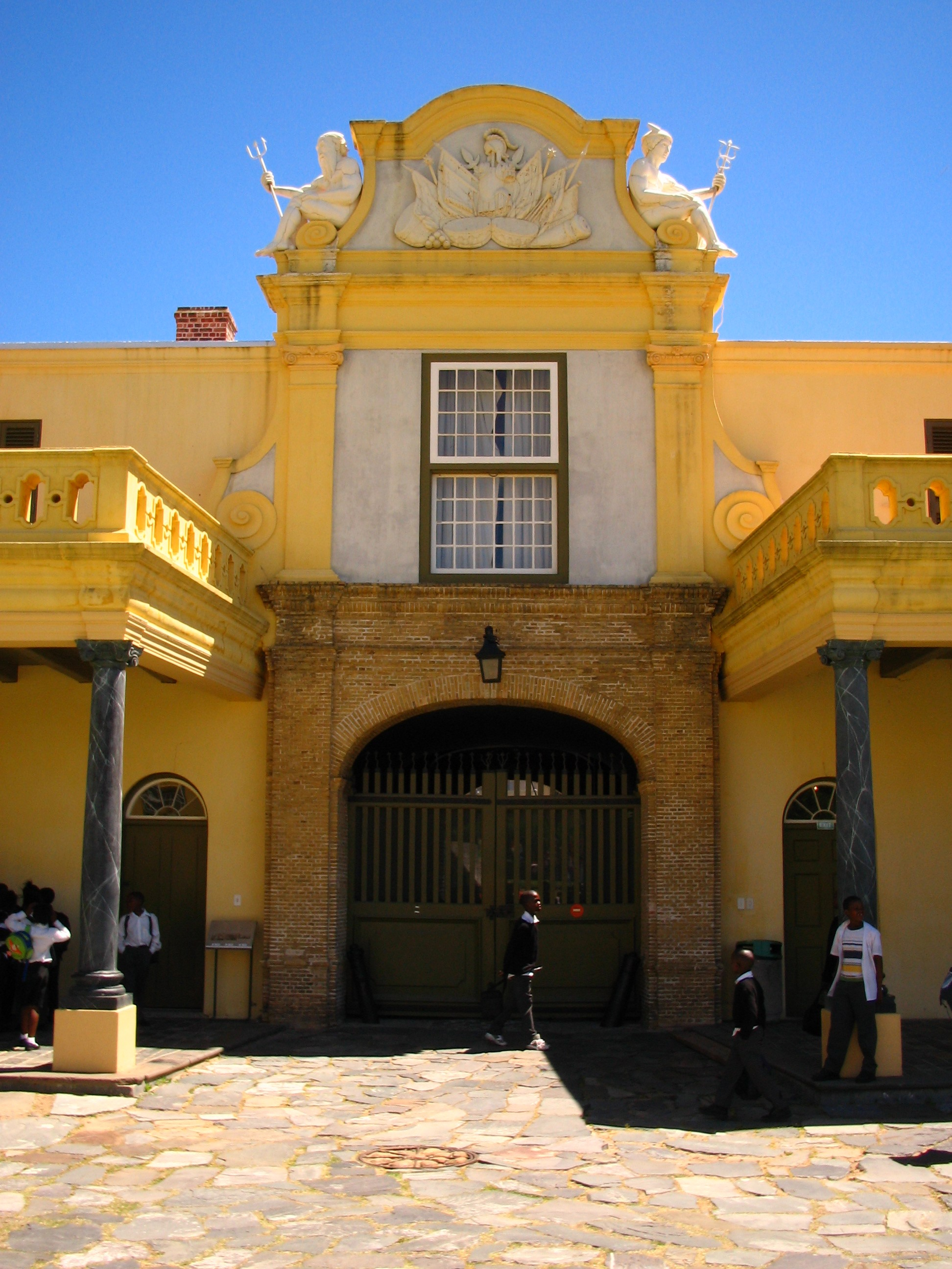 Hoofdingang (binnenzijde), Kasteel van Goede Hoop, Kaapstad.